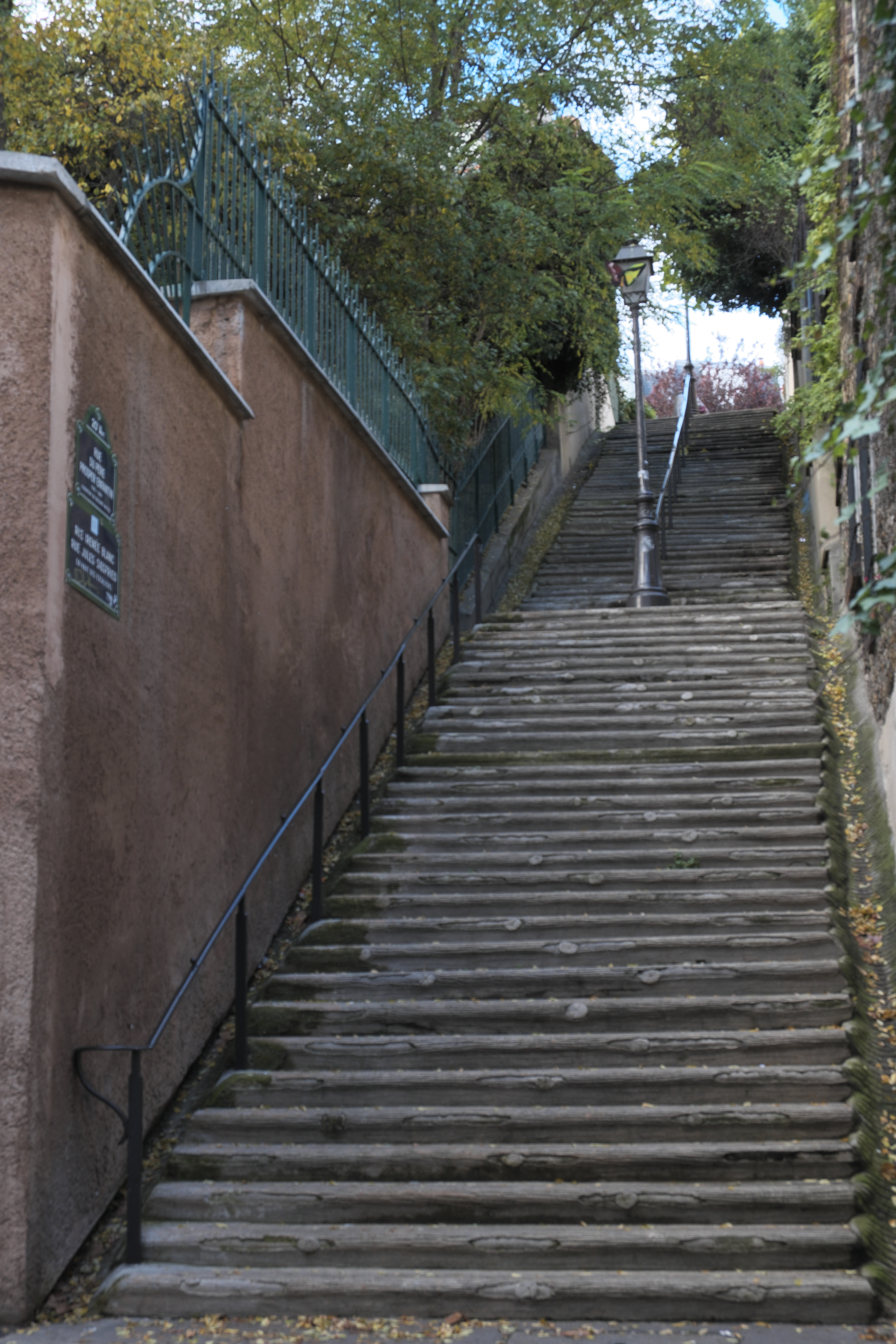 La Campagne à Paris im 20. Arrondissement in Paris (Frankreich), Treppe